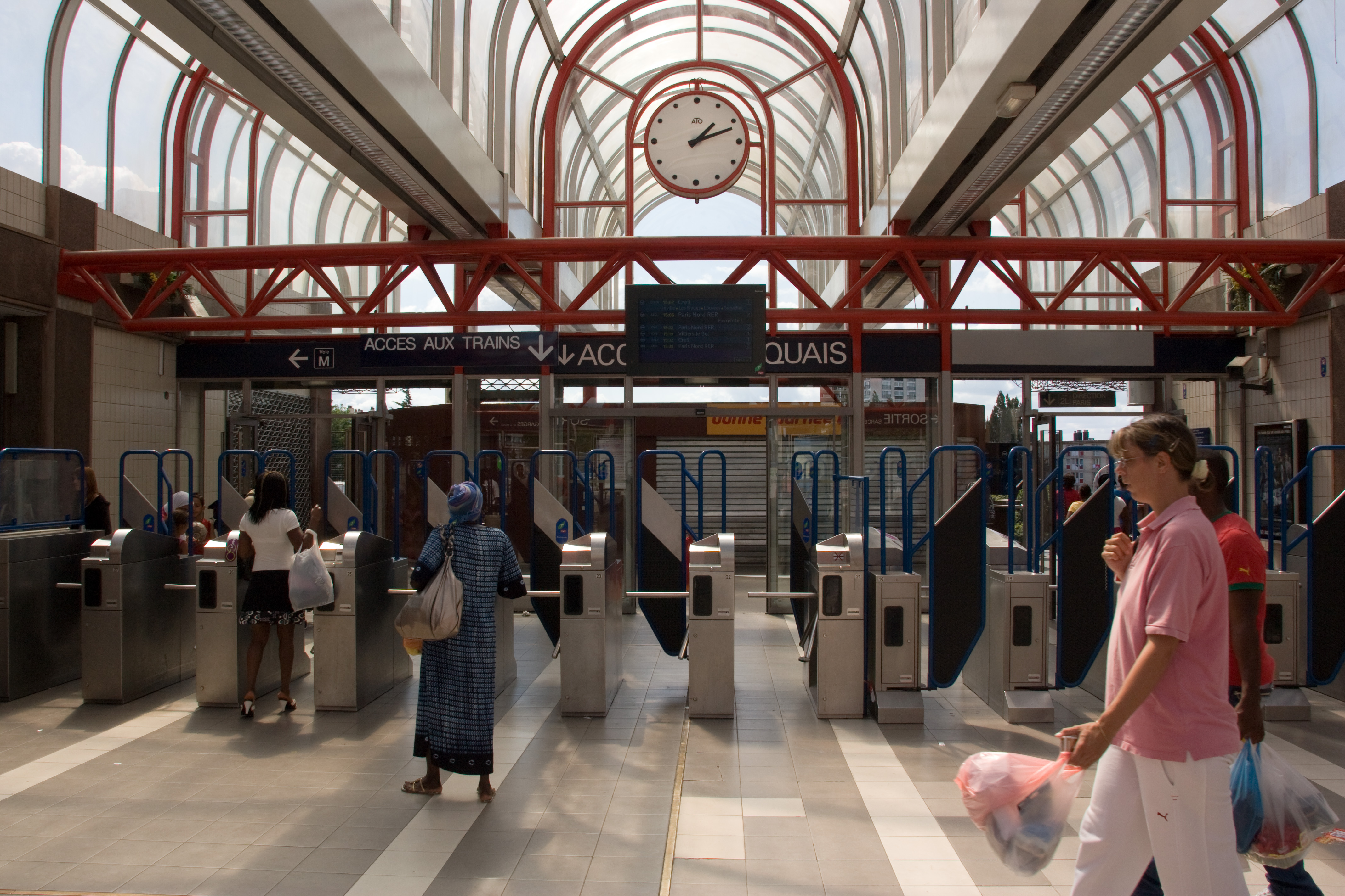 La Gare de Garges - Sarcelles, département du Val-d'Oise, France